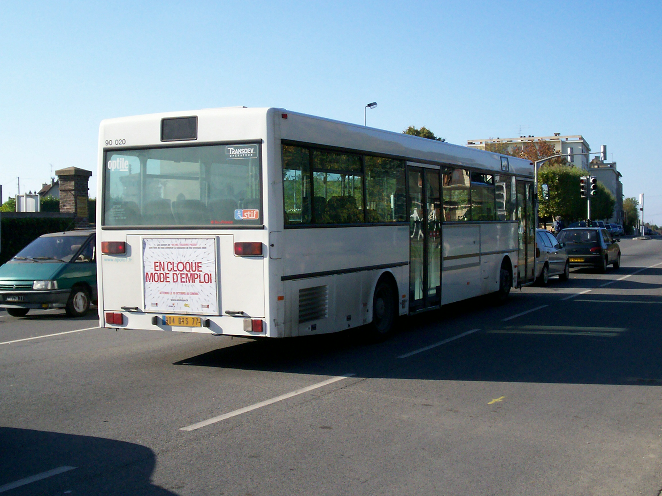 Bus apolo7 en direction de Villevaudé Lavoir, en gare de Vaires.